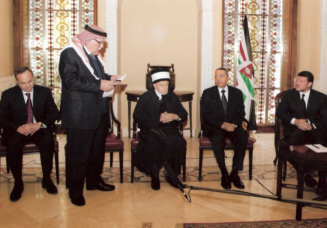 Adnan Giving a speach addressing HM King Abdullah II